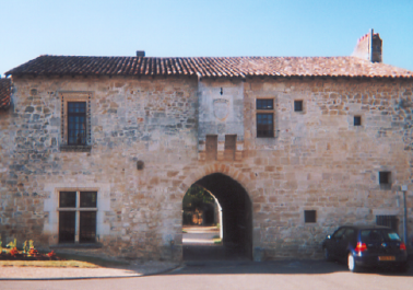 Façade du logis abbatial de Fontaine-le-Comte Date : 13 juin 2004